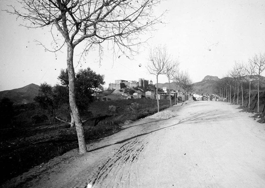 Imatge